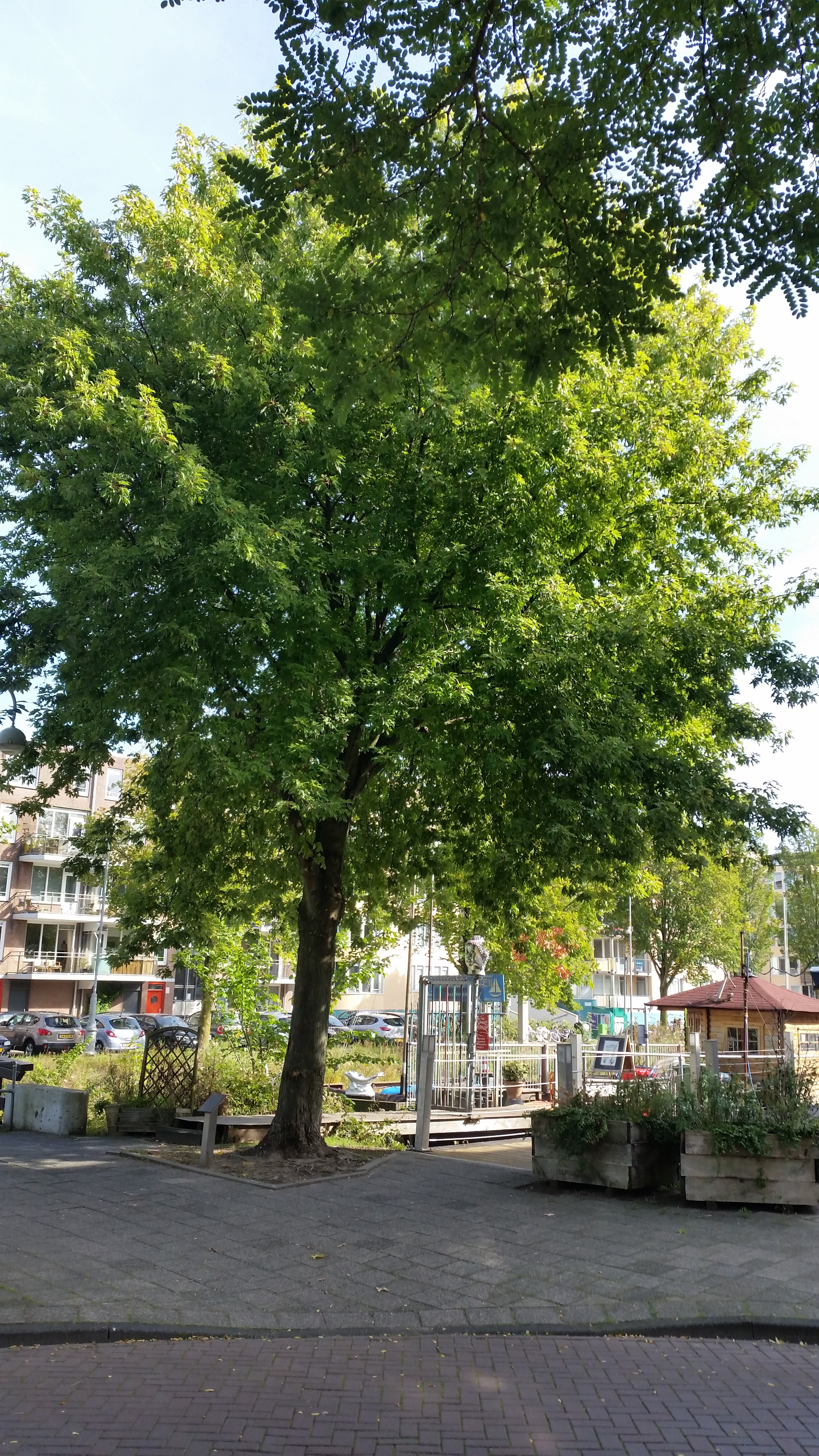 Toekomstboom nabij Brug 1910, Robiënnabrug